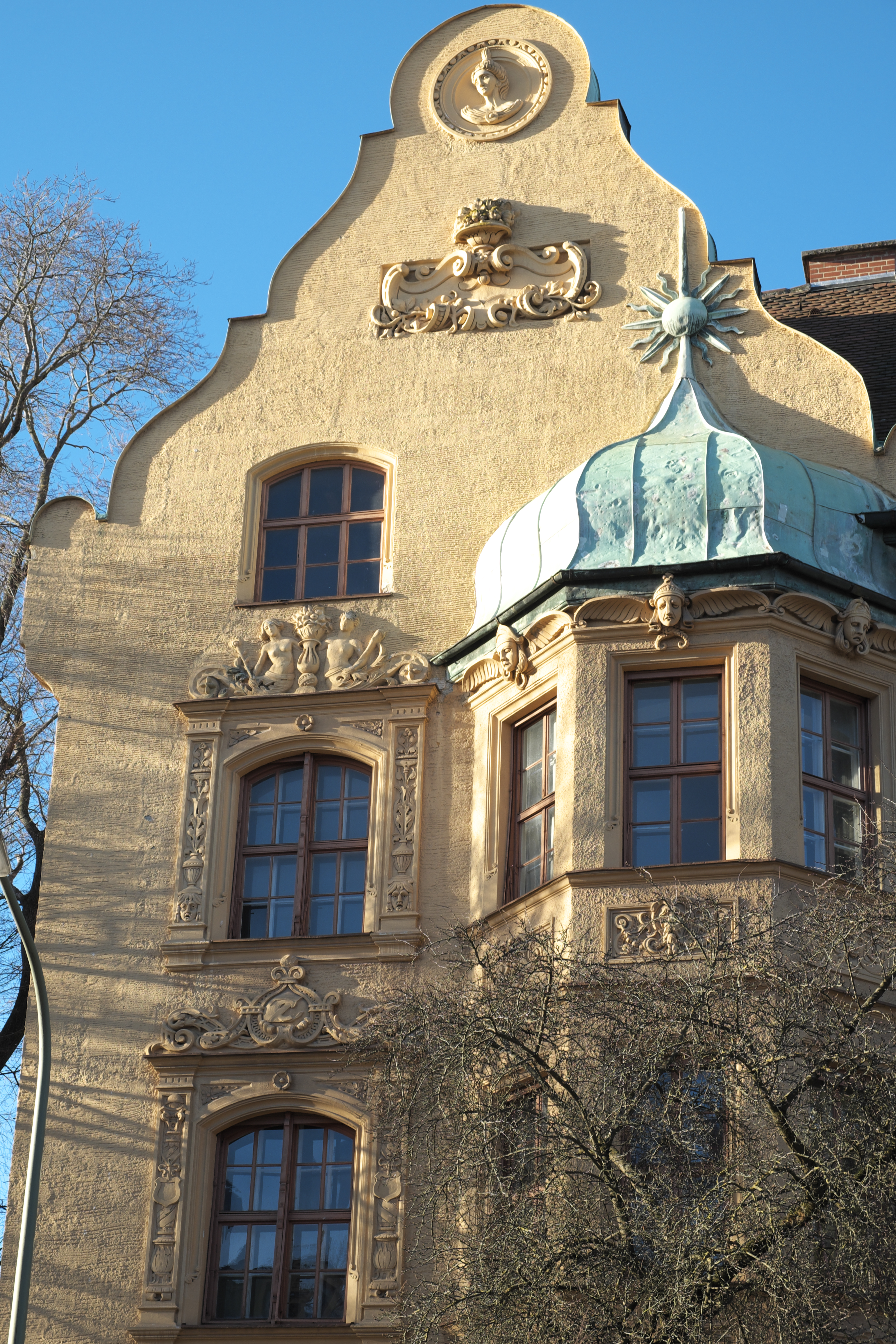 Mietshaus in der Schubertstraße 8 in der Ludwigsvorstadt im Stadtbezirk Ludwigsvorstadt-Isarvorstadt in München (Bayern/Deutschland), 1894/95 von Wilhelm Spannagel erbaut